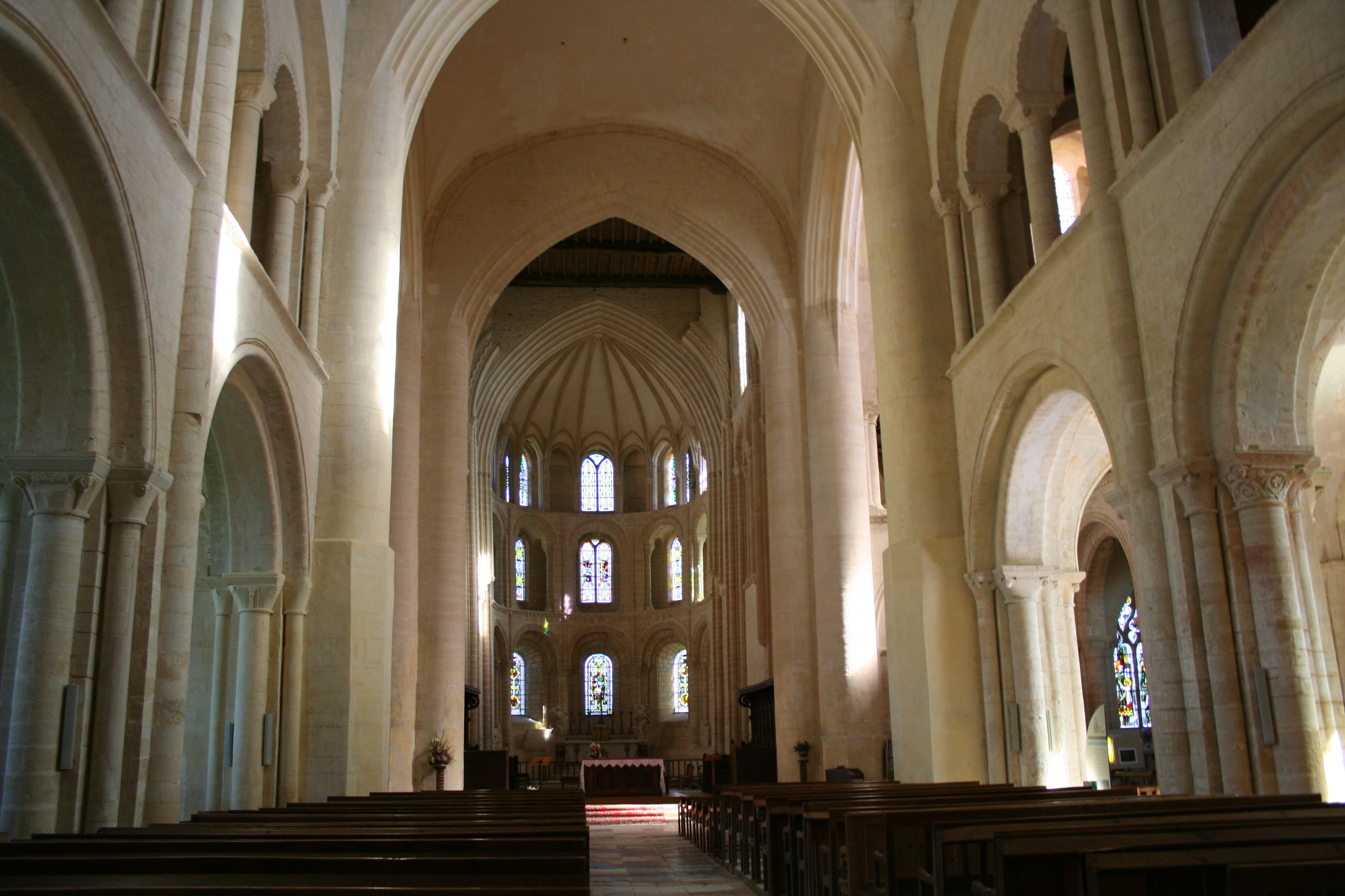 Choeur de l'abbaye de Cerisy la Forêt - Manche - France